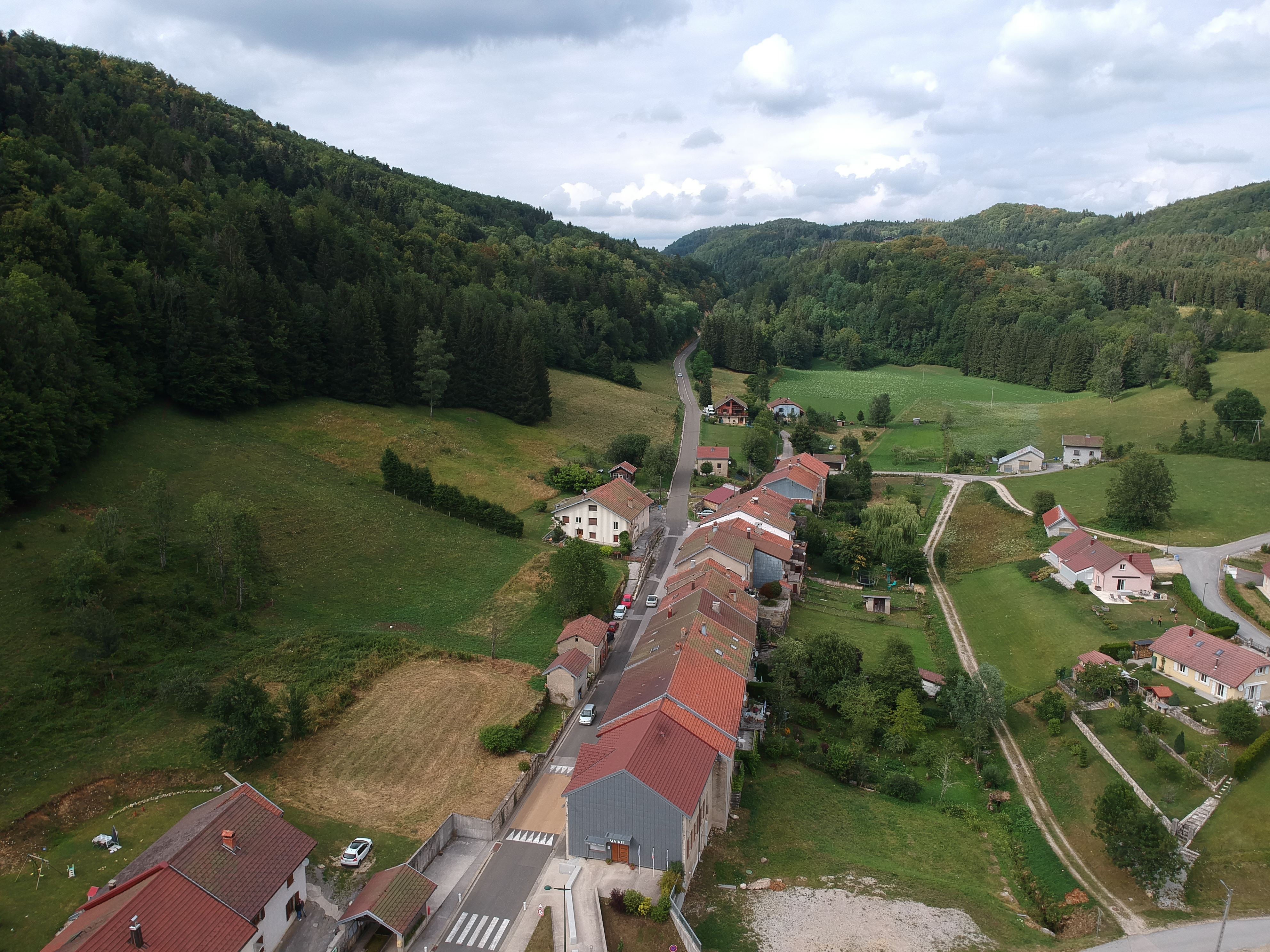 Image de Leschères, Jura, France en juillet 2018.